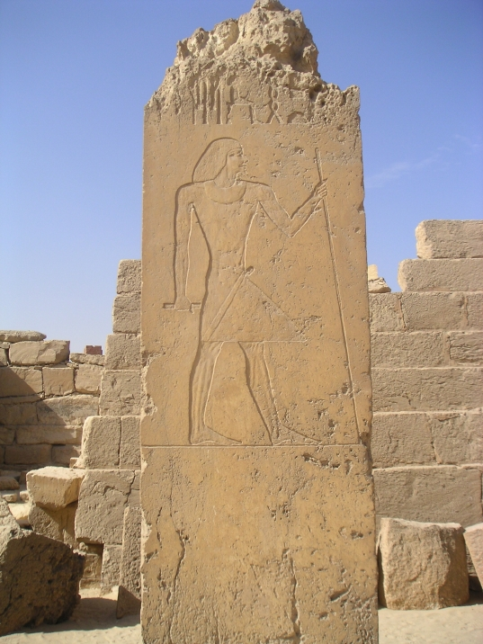 Relief représentant le vizir Ptahchepsès - Ve dynastie égyptienne